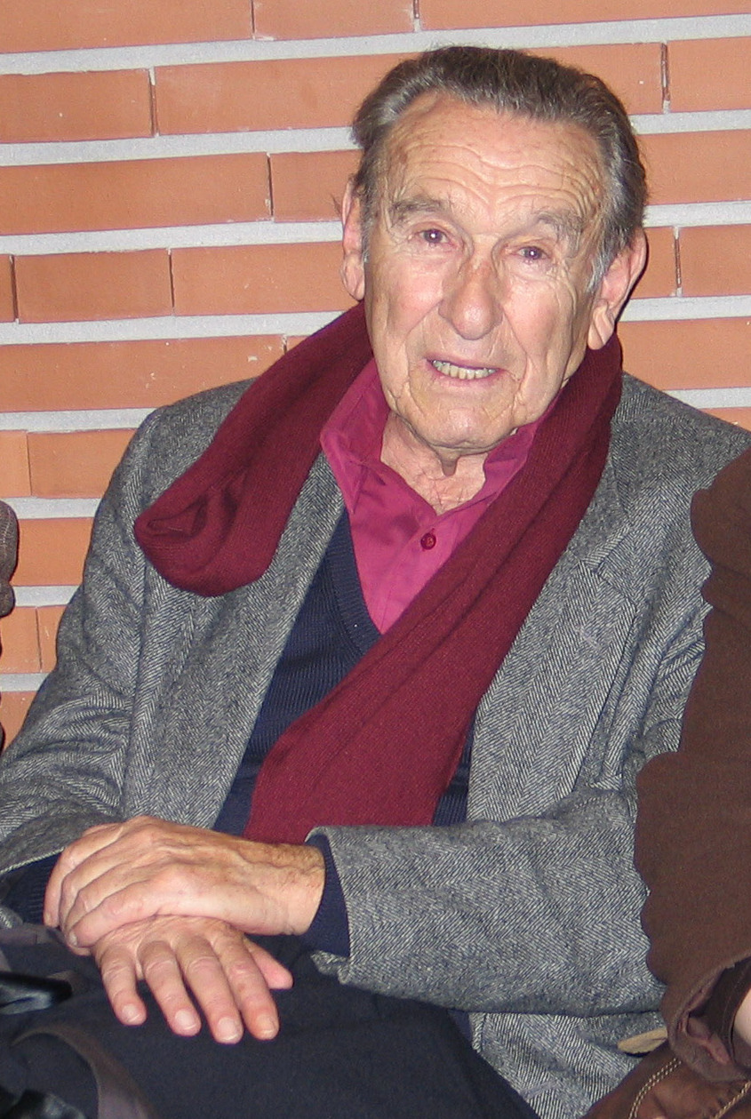 Carlos Blanco Aguinaga en un congreso sobre el exilio vasco, en San Sebastian.